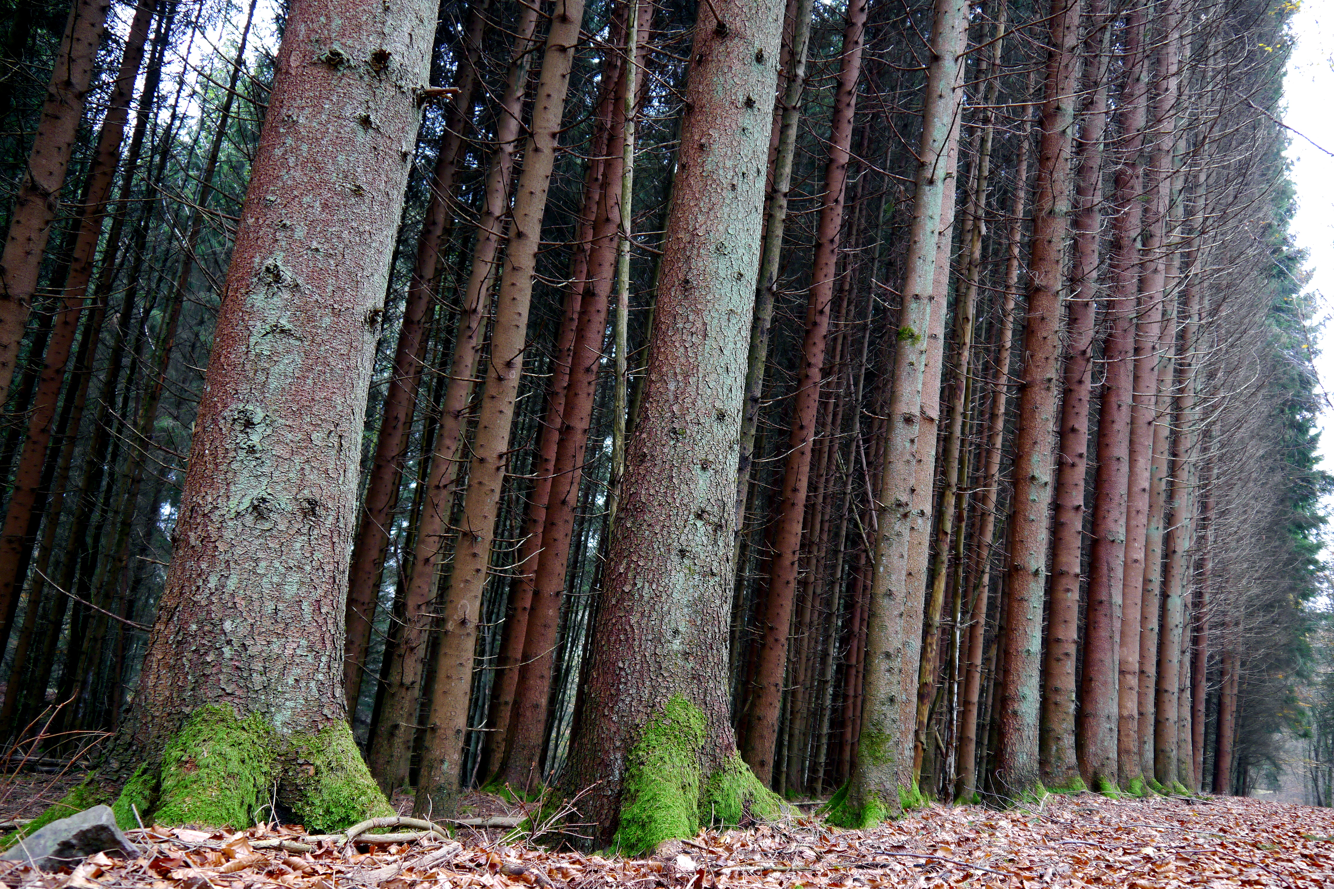 Hochgewachsener, düster wirkender Nadelwaldbestand (Fichten) in der Nähe des Leukbaches bei Orscholz (Gemeinde Mettlach, Saarland) im Landschaftsschutzgebiet L 1.00.16 „Saarschleife und Leukbachtal“.